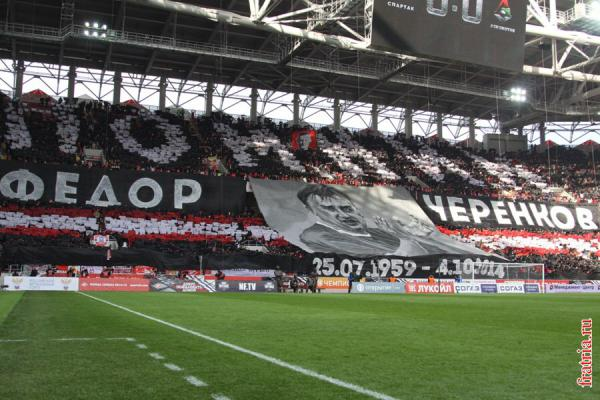 Перформанс, посвященный памяти Федора Черенкова